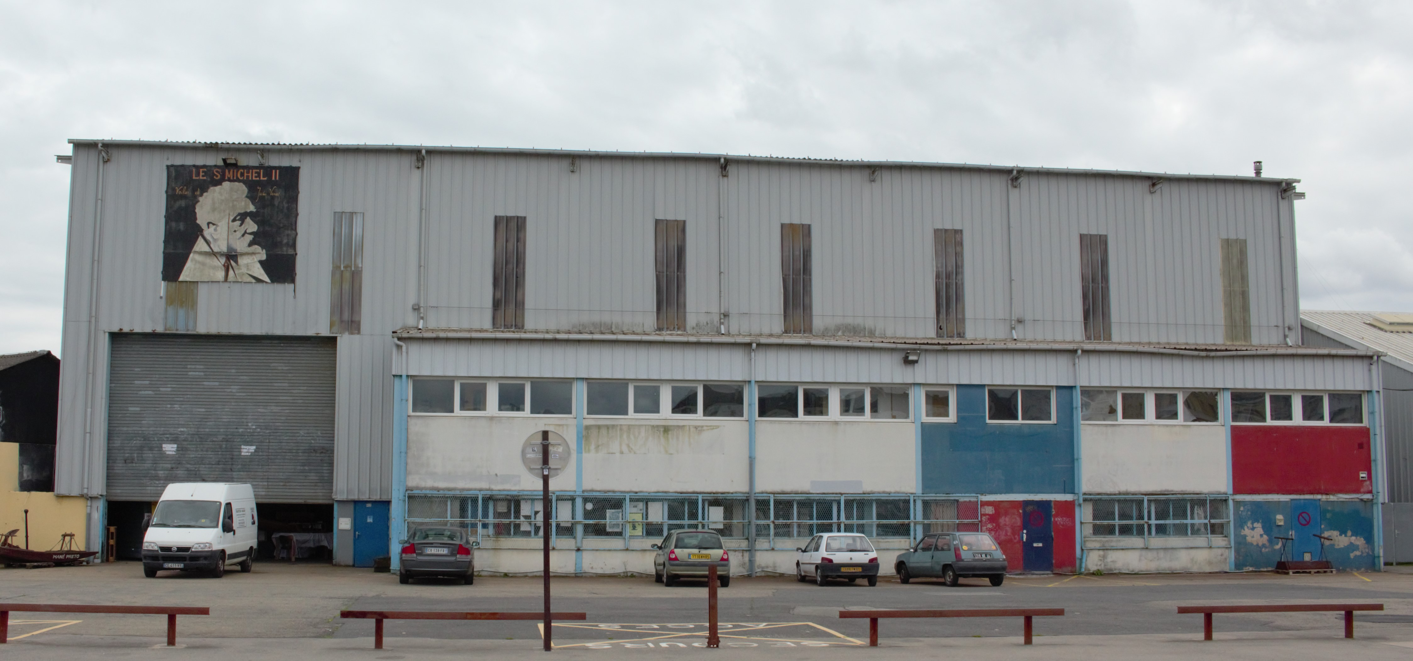 Hangar de l'association